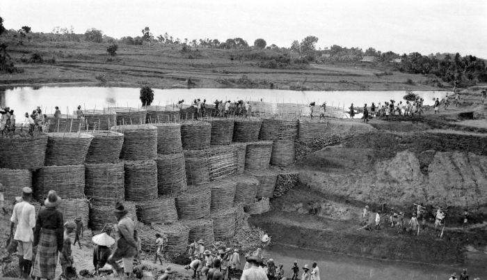 Repronegatief. In de 'zuidwesterarm' van Celebes kwam al veel 'natte' rijstbouw voor, op bevloeibare velden (sawah) dus. Al in de 17e eeuw lezen we over vorsten van Goa en Bone die aanwezig zijn bij de aanleg van waterleidingen. Doordat er een zo groot surplus geproduceerd werd, kon de VOC er de Specerij Eilanden deels van rijst mee voorzien. Hier zien we de wel vaker voorkomende combinatie van hoge bevolkingsdichtheid, natte rijstbouw, gecentraliseerde staten en rijstexport. De bewaterbare velden waren van de regen afhankelijk of werden kunstmatig (middels irrigatie) bevloeid. (P. Boomgaard, 2001). Bouw van een stuwdam voor irrigatie aan de Palaka-rivier